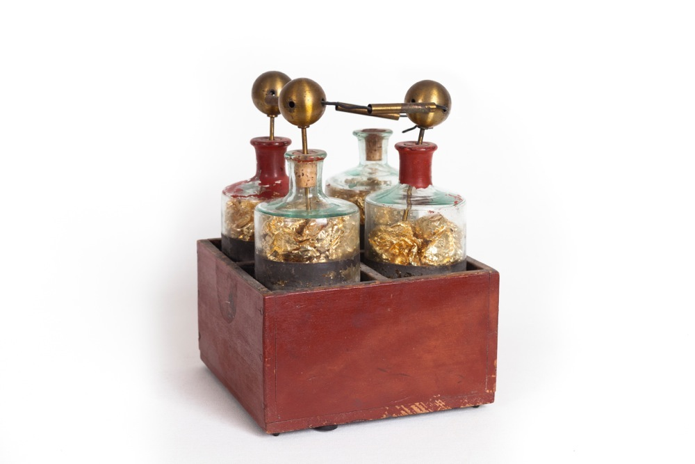 הסוללה הראשונה